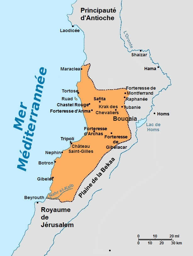 Comté de Tripoli en 1135